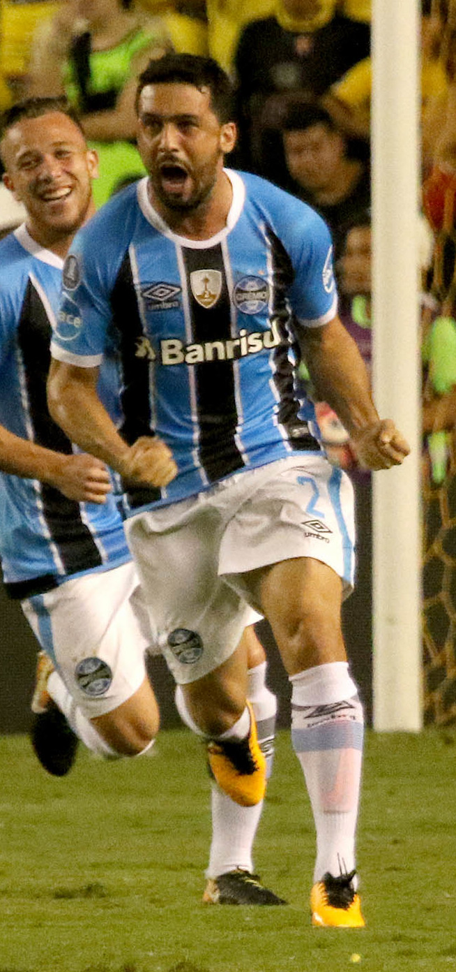 Guayaquil 25 de octubre del 2017 (Andes).- En el estadio Monumental, Barcelona se enfrenta a Gremio de Porto Alegre en el partido de ida por la semifinal de la Copa Libertadores 2017 Foto:Andes/César Muñoz